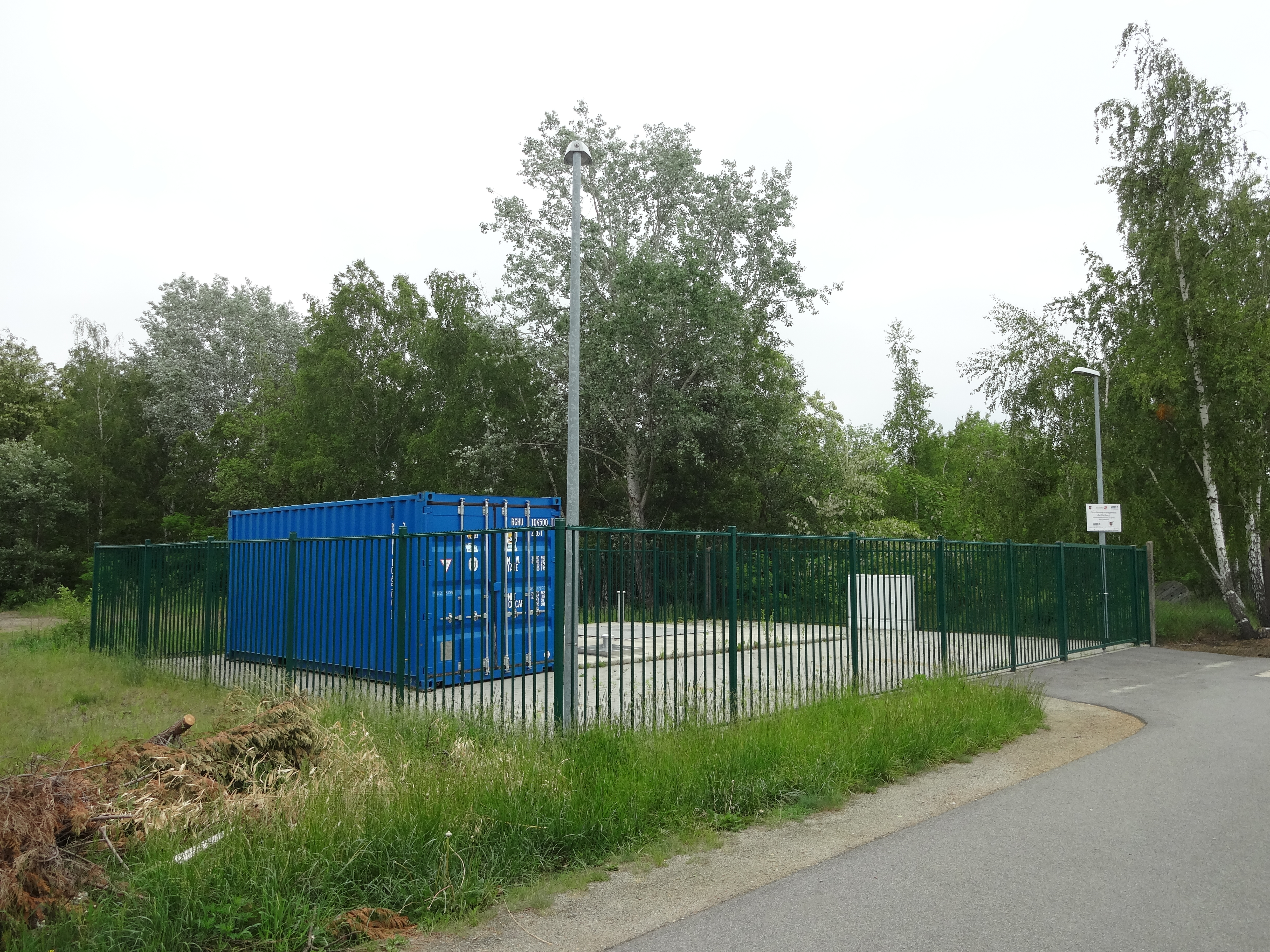 Horizontalfilterbrunnnen in der Güterbahnnhofstraße in Senftenberg